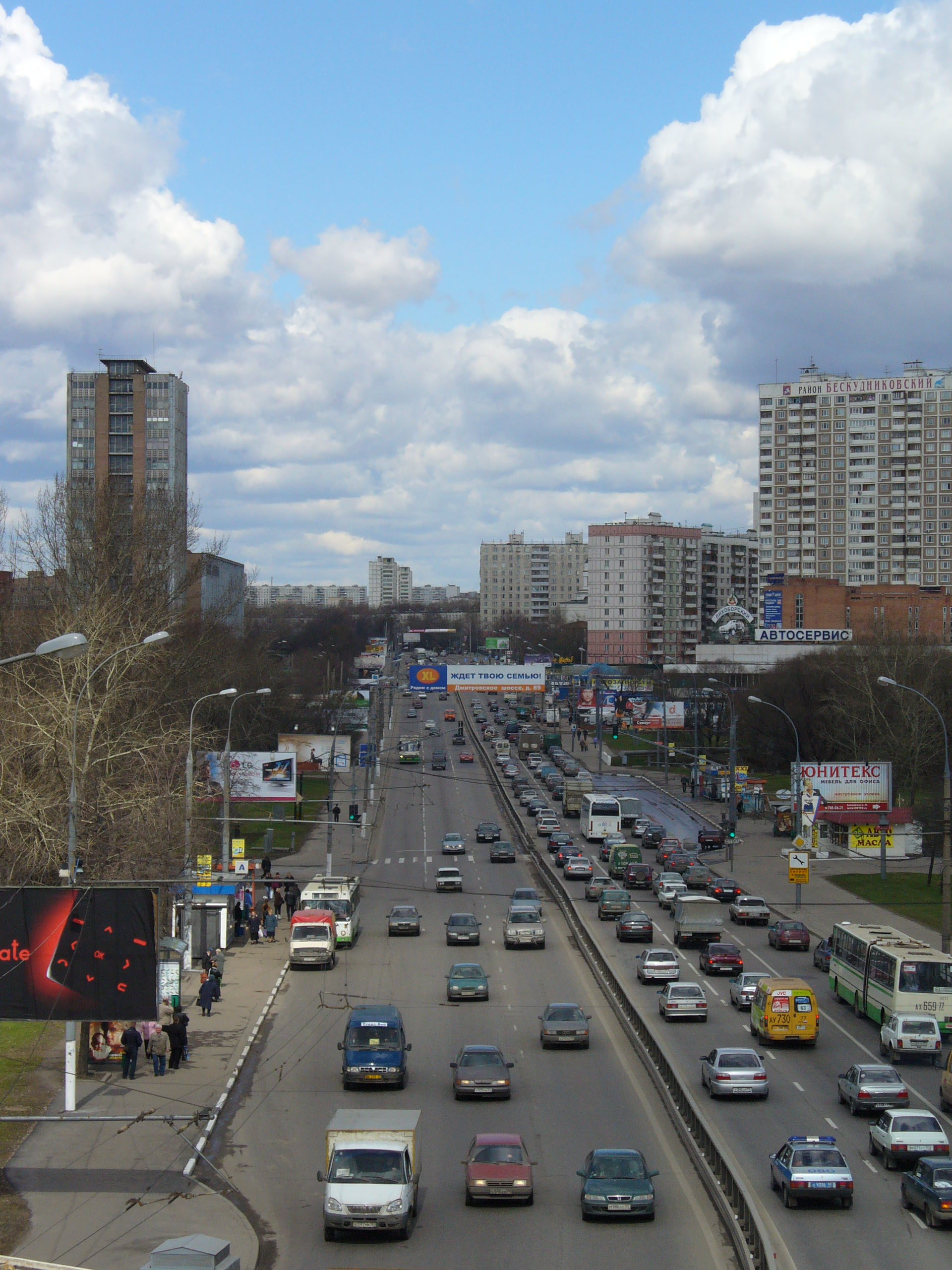 Beskudnikovsky District, Moscow, Russia